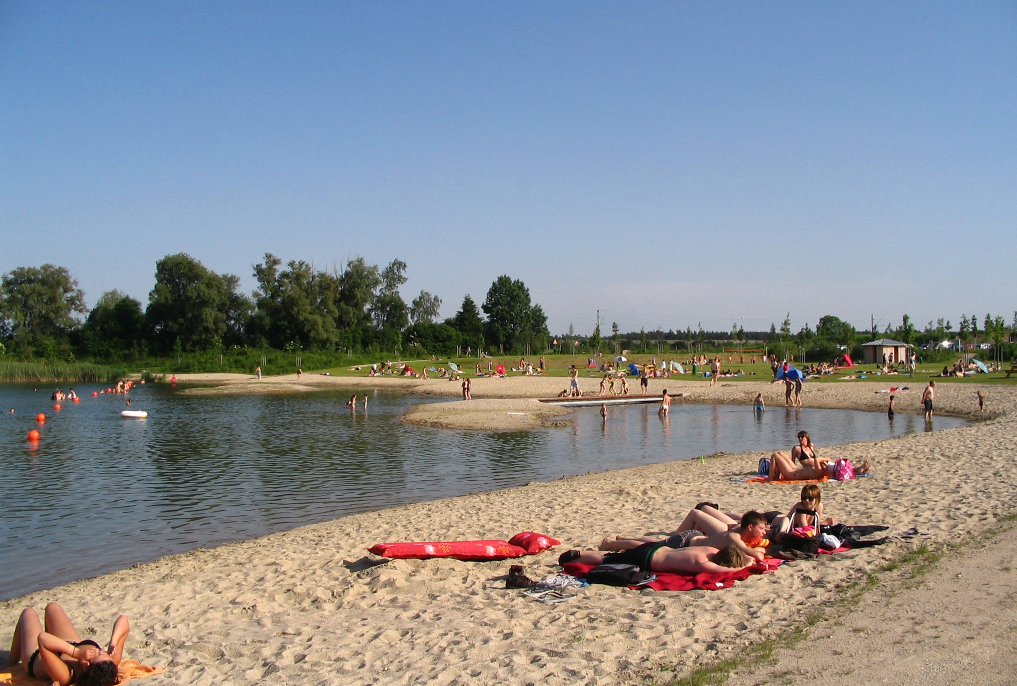 Neustadt an der Donau: Naherholungsgebiet und Freizeitgelände Schwaiger See